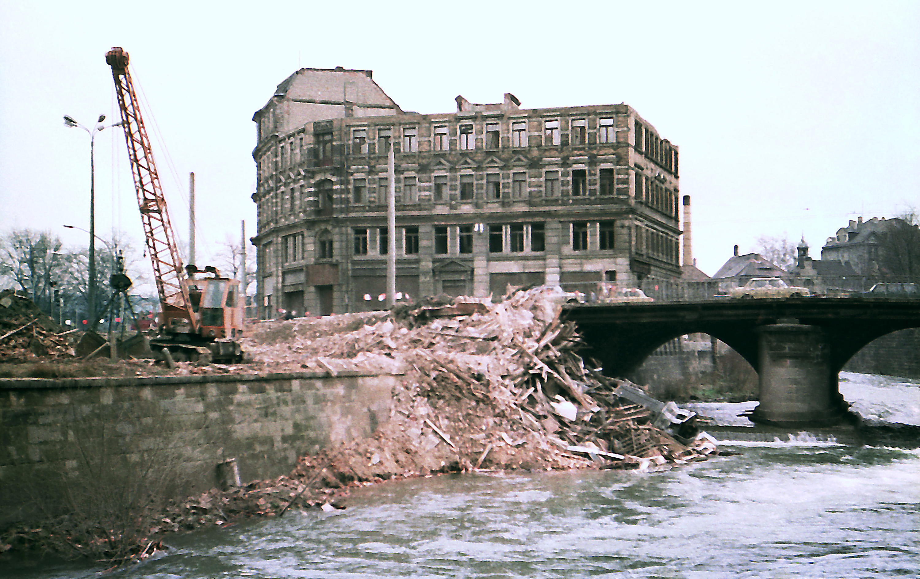 01.04.1988 Dresden-Löbtau: Blick vom Westufer der Weißeritz auf das Haus Willi-Ermer-Platz 15 (später Ebertplatz, GMP: 51.043204,13.704971). Nach links folgt Nr. 14. Sie werden für den Weiterbau der Hochstraße Nossener Brücke als Löbtauer Brücke (deren vorhandener Ost-Teil "Brücke der Jugend" hieß) abgerissen. Rechts die alte Weißeritzbrücke (Bismarckbrücke, GMP: 51.043457,13.704706). Links steht der Kran auf den Trümmern von Freiberger Str. 126/128. [F19880215A56.JPG]19880401120NR.JPG(c)Blobelt